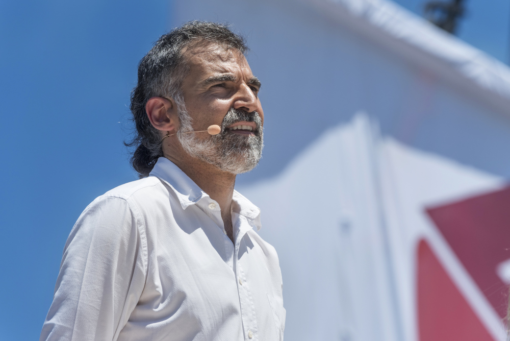 Acte "11J: Referèndum és Democràcia", organitzat per l’Associació de Municipis per la Independència (Neus Lloveras), l’Assemblea Nacional Catalana (Jordi Sànchez) i Òmnium Cultural (Jordi Cuixart)